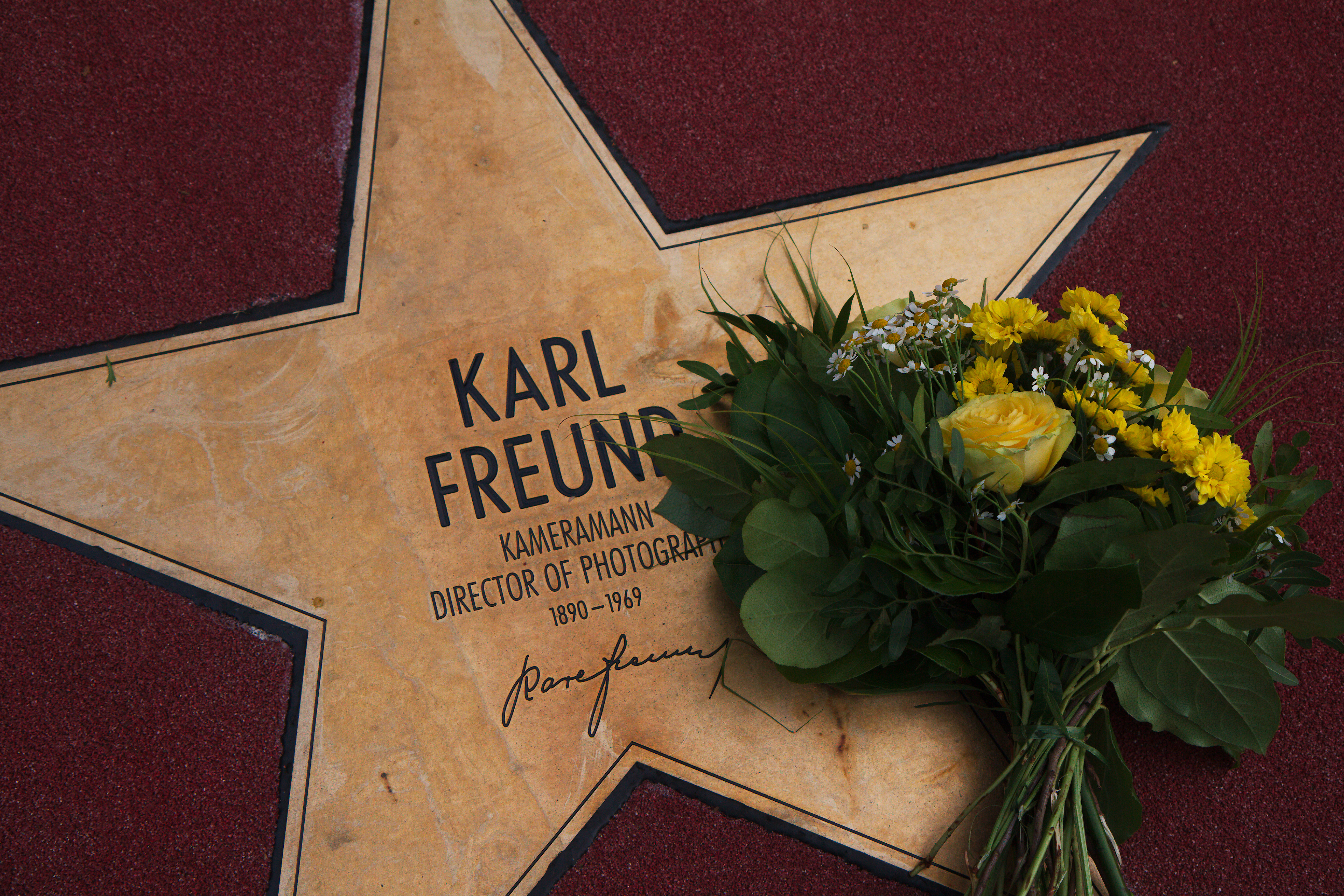 Der Stern für Carl Freund mit Blumen von Klaus Wowereit